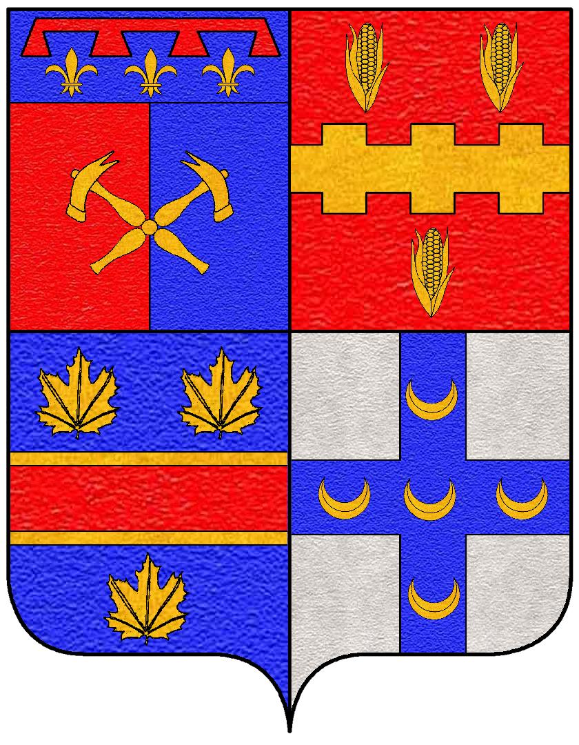 Inquartato: 1° Sergardi, 2° Spannocchi, 3° Biringucci, 4° Piccolomini.